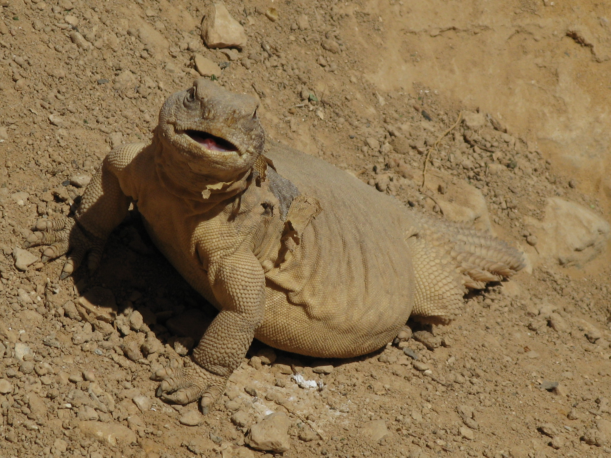 חרדון צב בחי-בר במצפה רמון